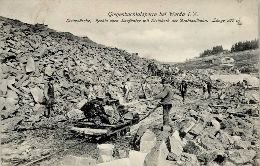 Ansichtskarte aus der Zeit des Baus der Talsperre Werda.